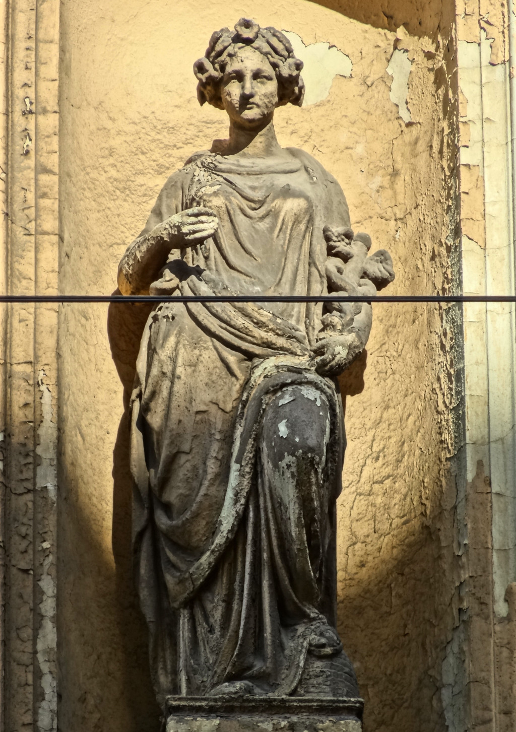 Kamienica przy ul. Gdańskiej 9 w Bydgoszczy. Rzeźba - alegoria handlu